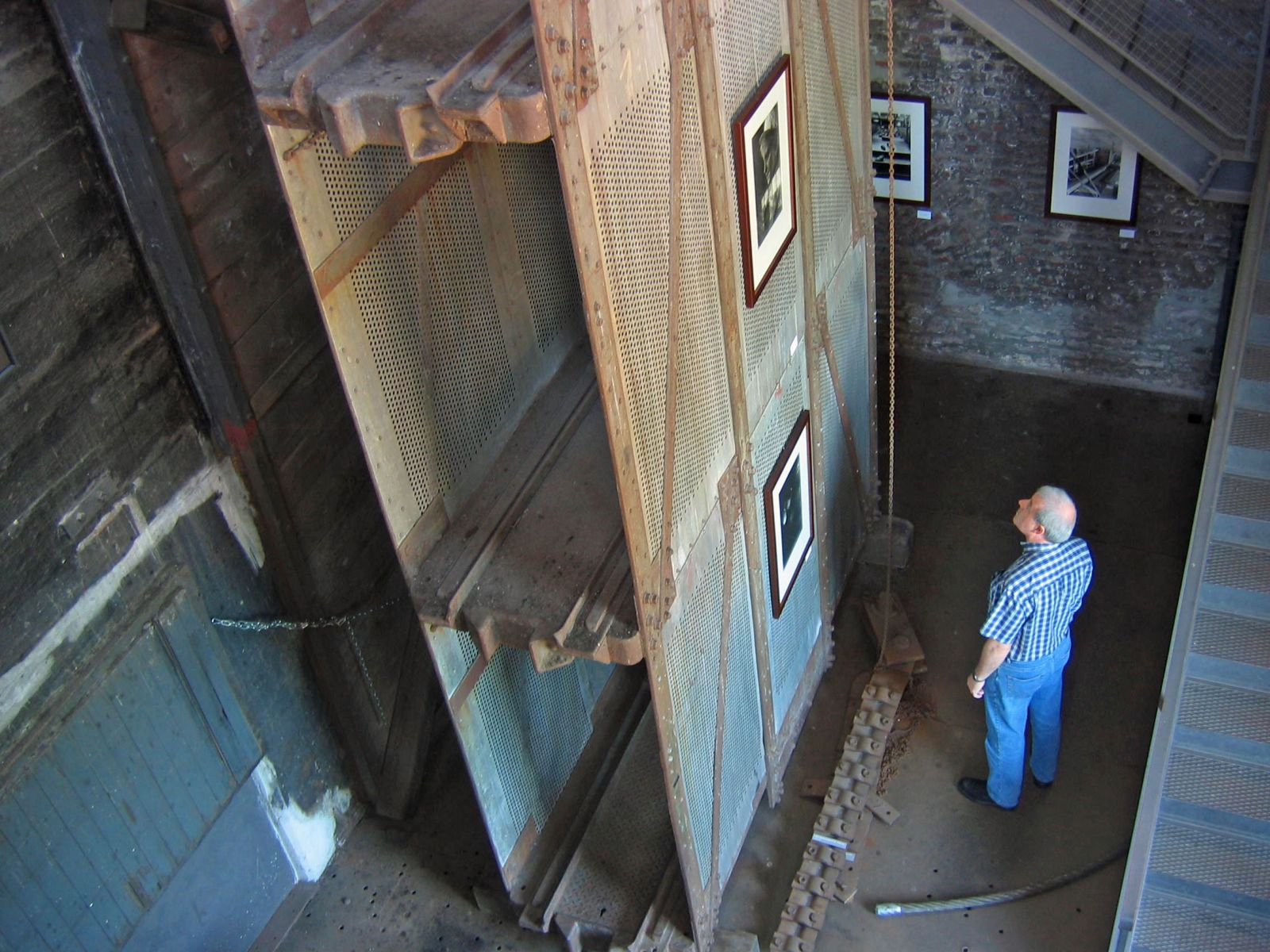 Zeche Hannover Förderkorb eigenes Foto 2006